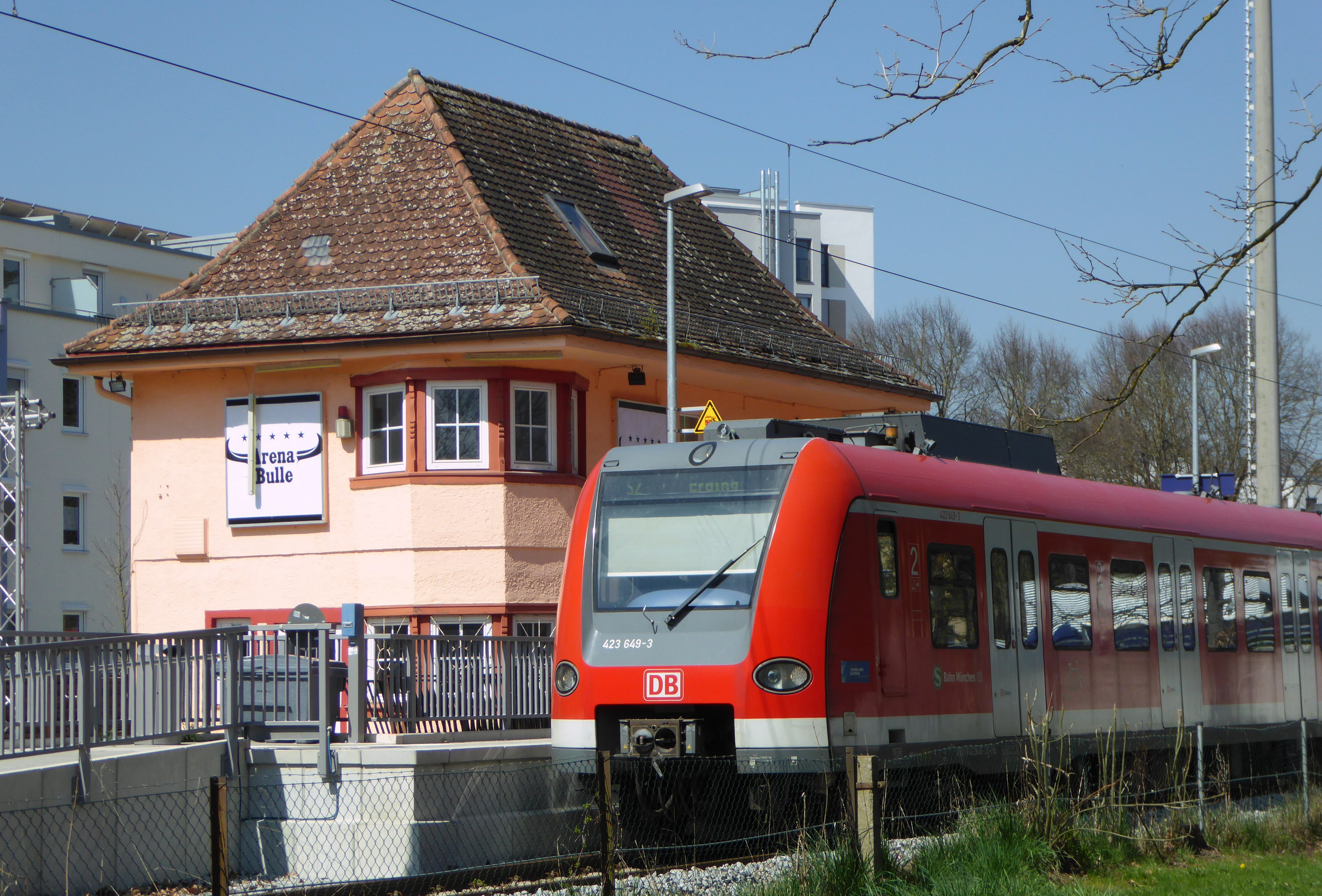 Triebzug der Münchner S-Bahn am Bahnhof Dachau Stadt.